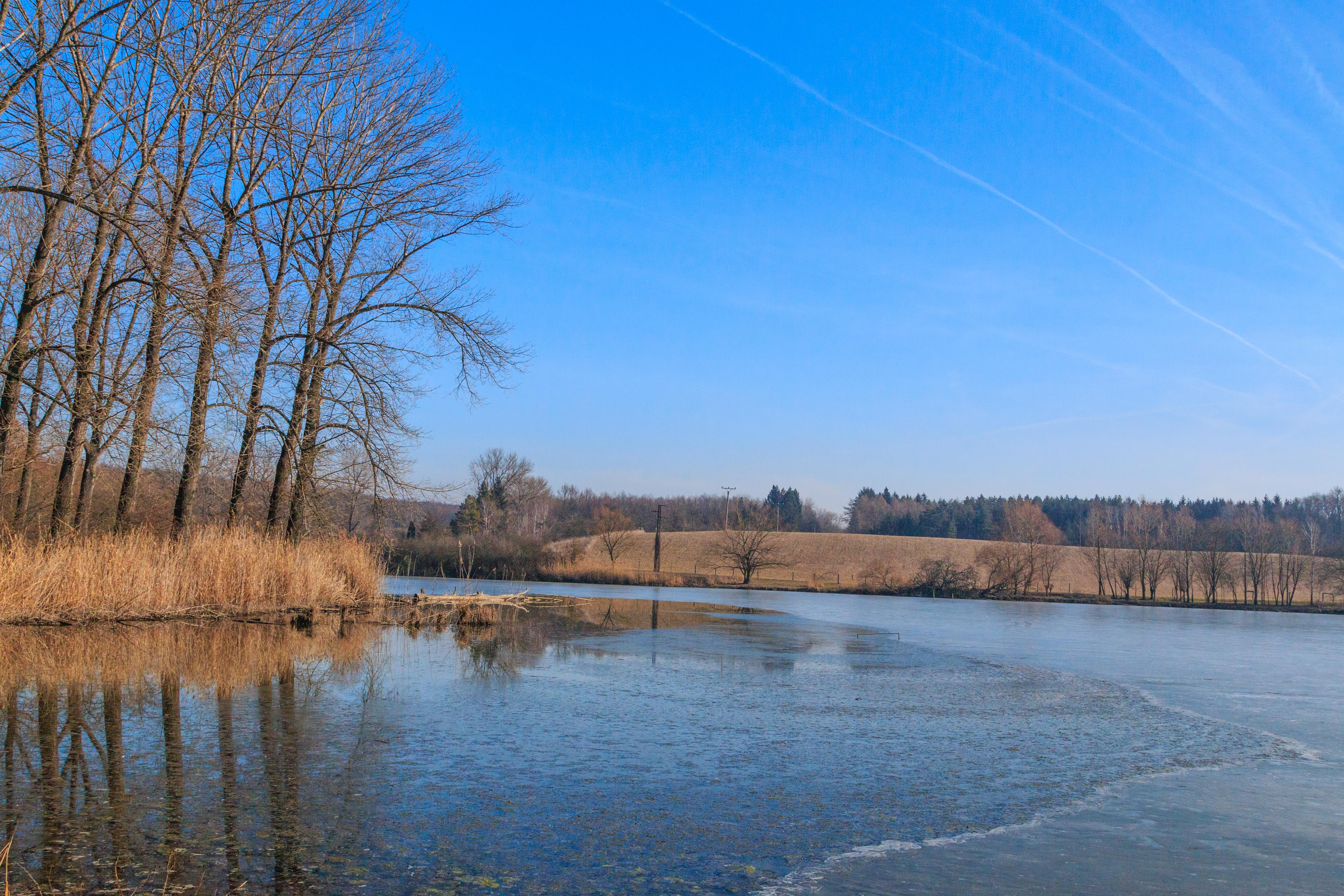 pohled na Třeboňský rybník u Rožďalovic Project: Vodstvo Ticket: 1711.